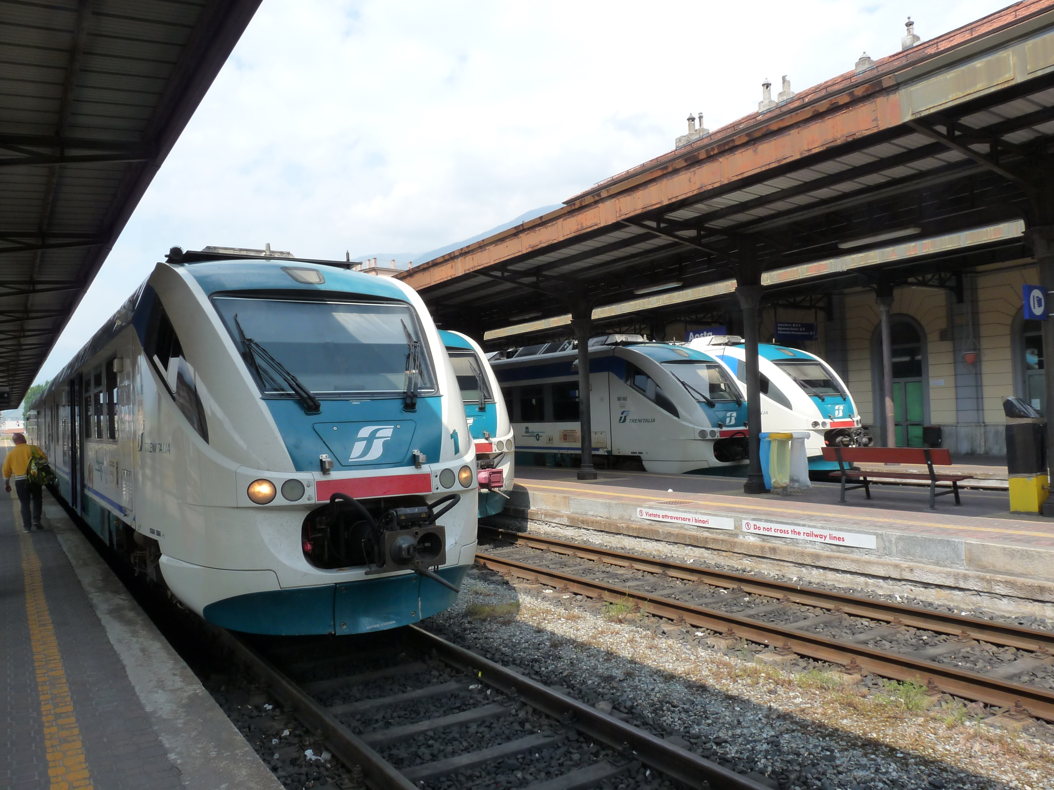 Het station van Aosta